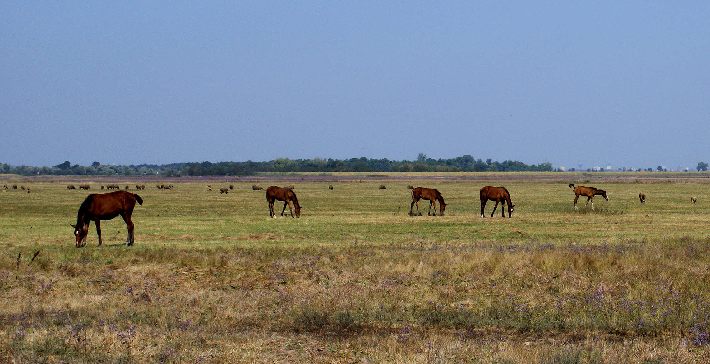 lovak a Gyula környéki pusztán